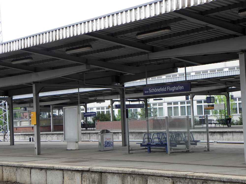 Bilder aus Berlin